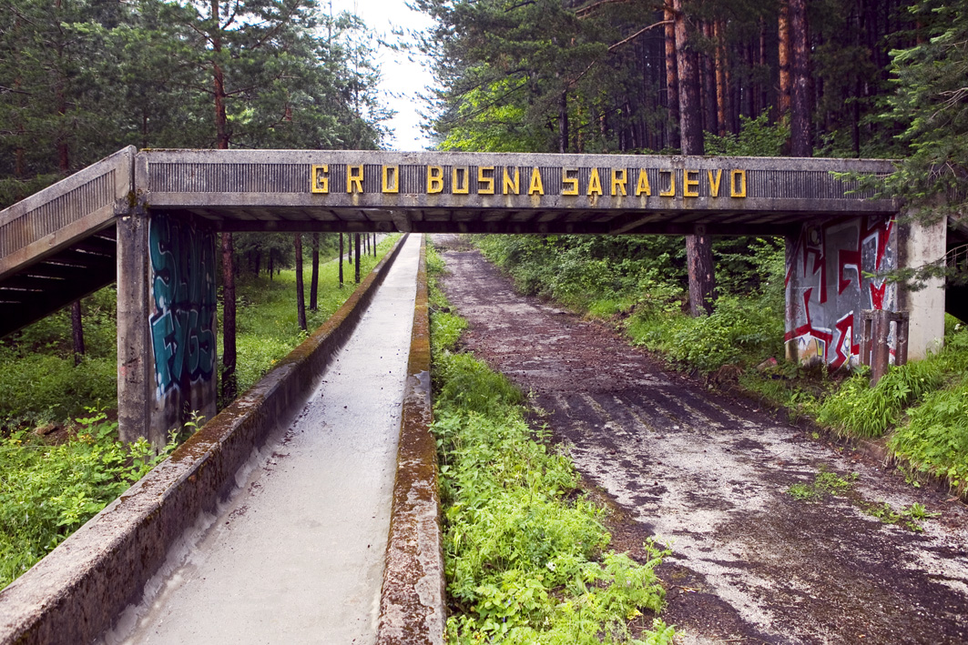 Объект зимний олимпийских игр в Сараеве, 1984